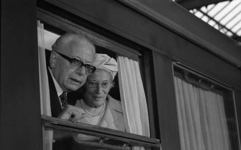 Altbundespräsident bei der Abfahrt nach Essen